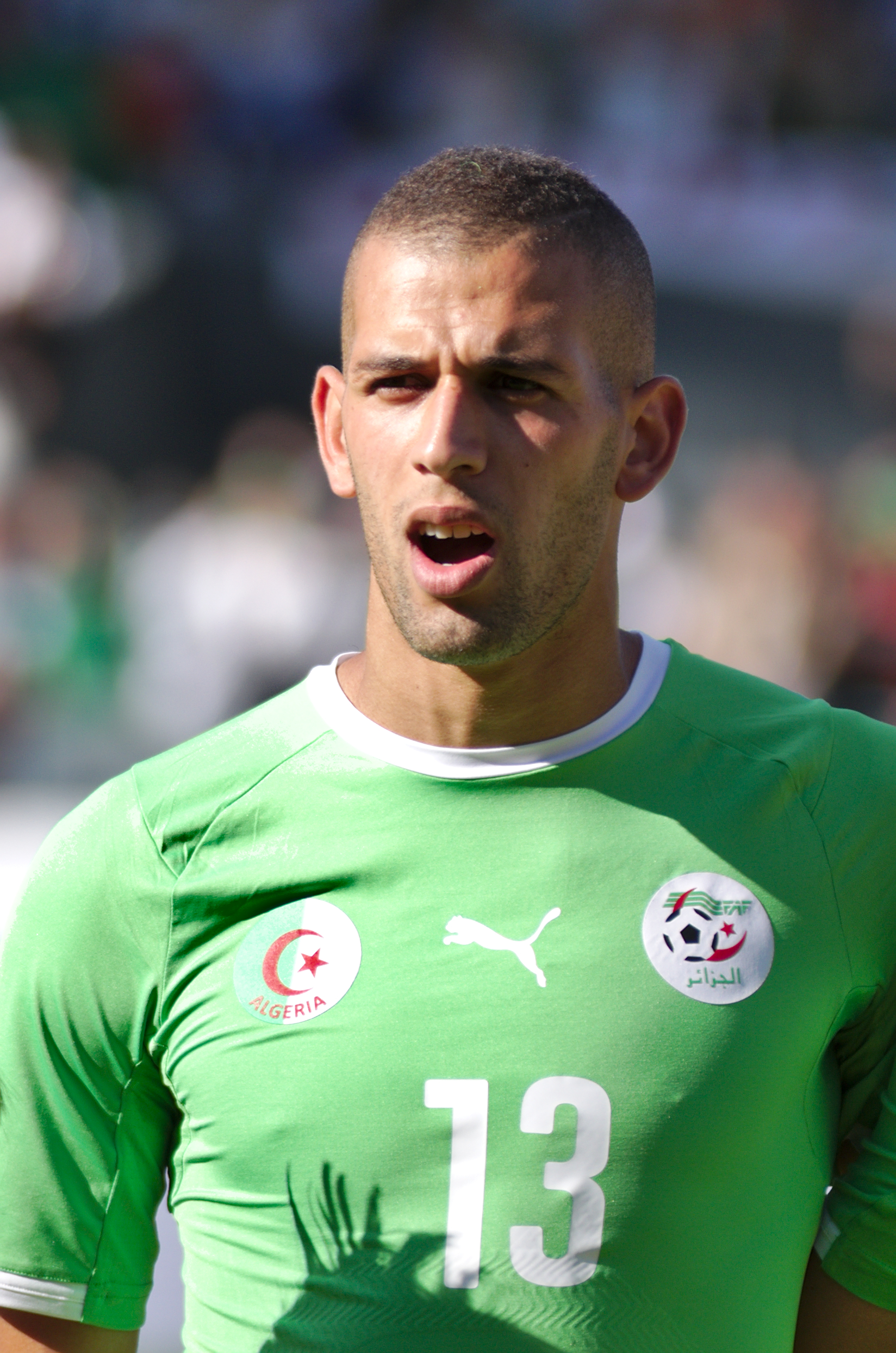 Algérie - Arménie - 20140531 - Islam Slimani